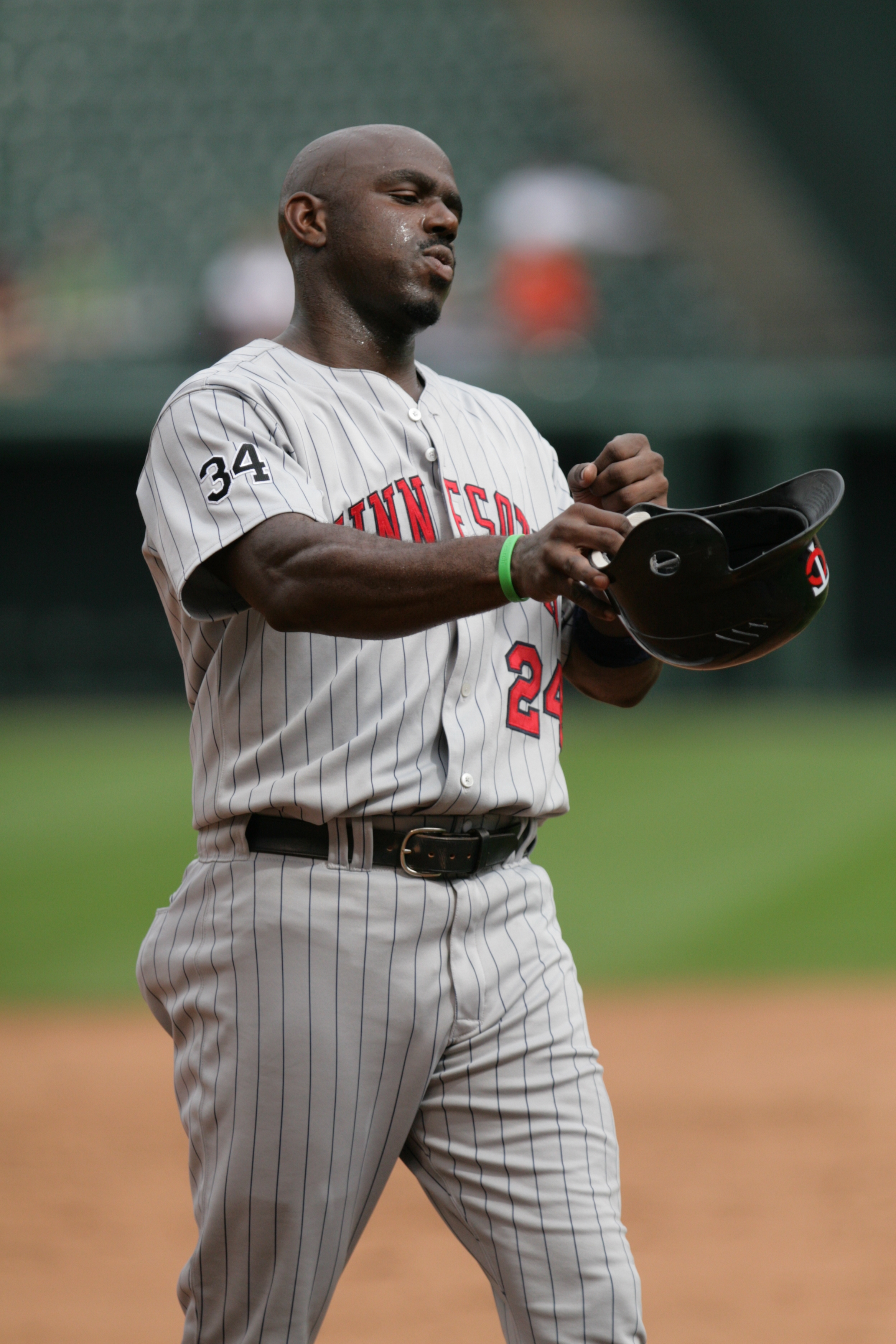 Rondell White